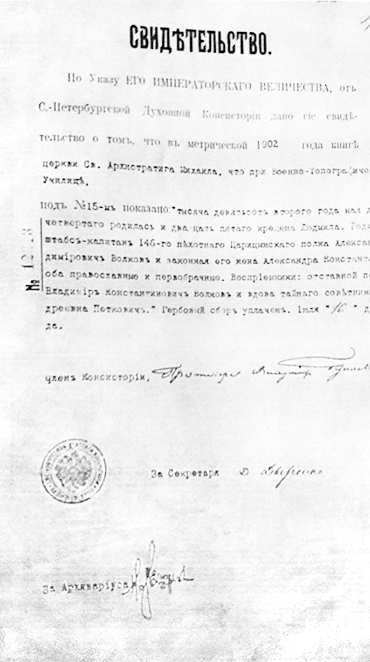 Свидетелство за раждане на внучката на Константин Петкович.